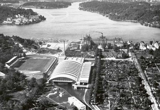 Flygbild över Hornsbergsgaraget och intilliggande områden. I fonden skymtar Stora Bryggeriet och Ulvsundasjön